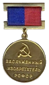 Нагрудный знак почётного звания "Заслуженный изобретатель РСФСР" (с колодкой 1-го типа)